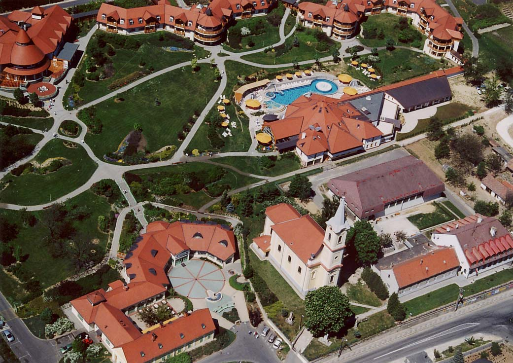 Alsópáhok - Hungary - Europe